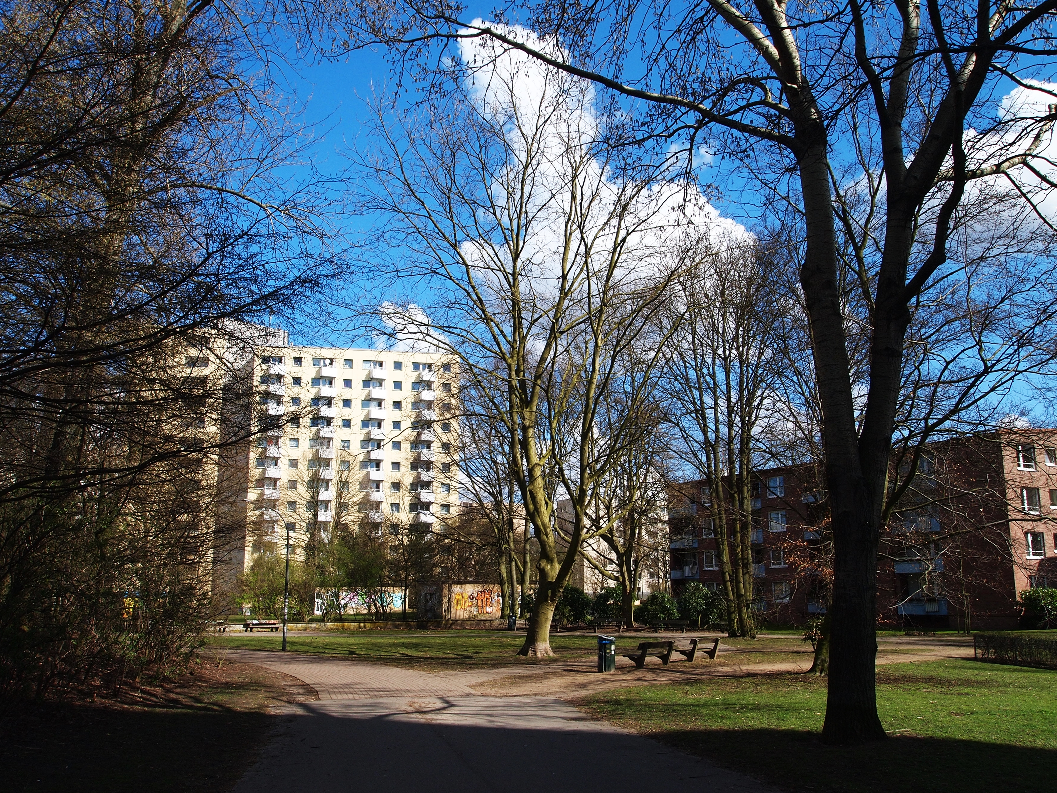 Altoner Grünzug - hier: Walter-Möller-Park